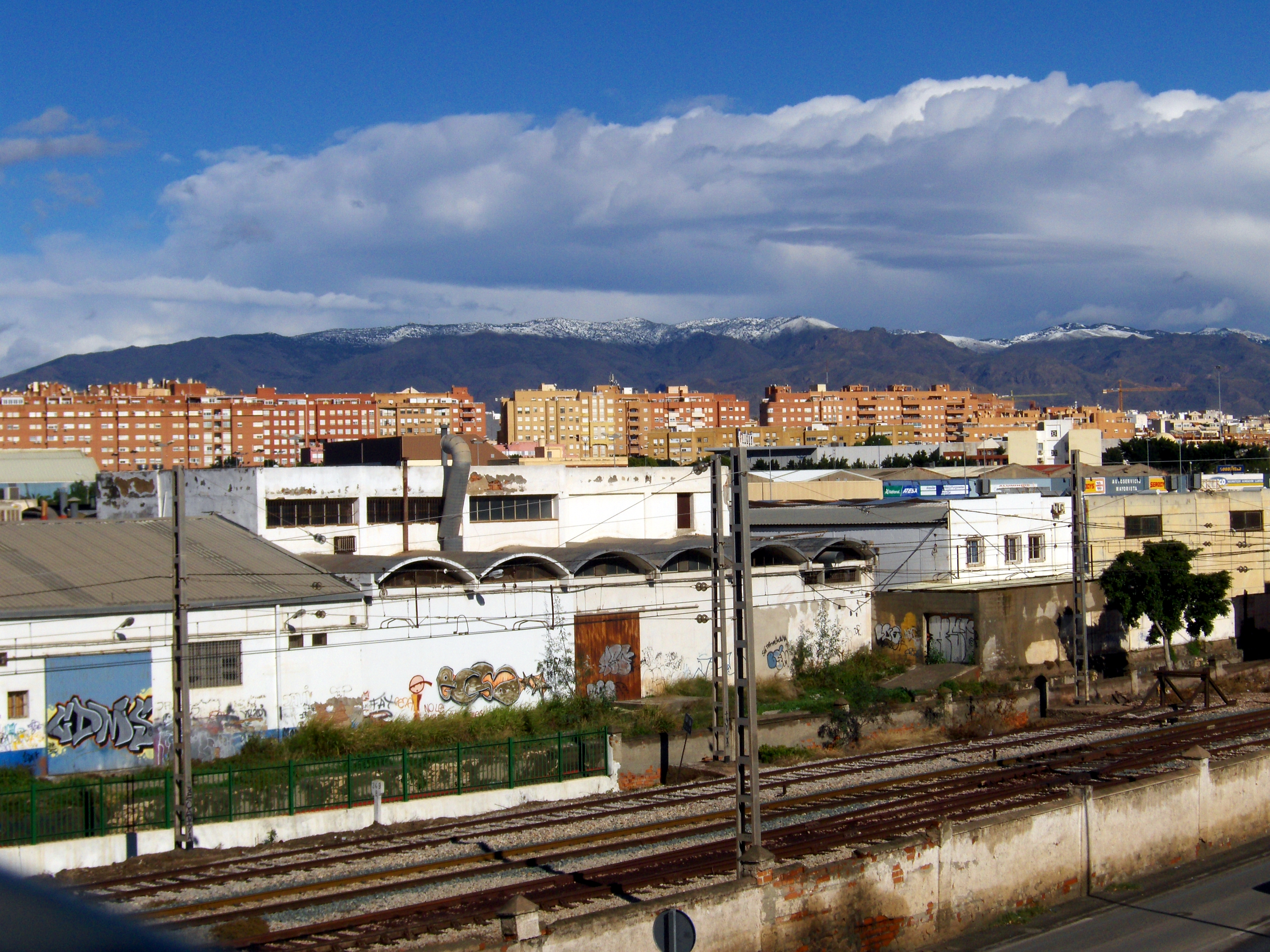 Sierra Alhamilla, nevada sobre Almería